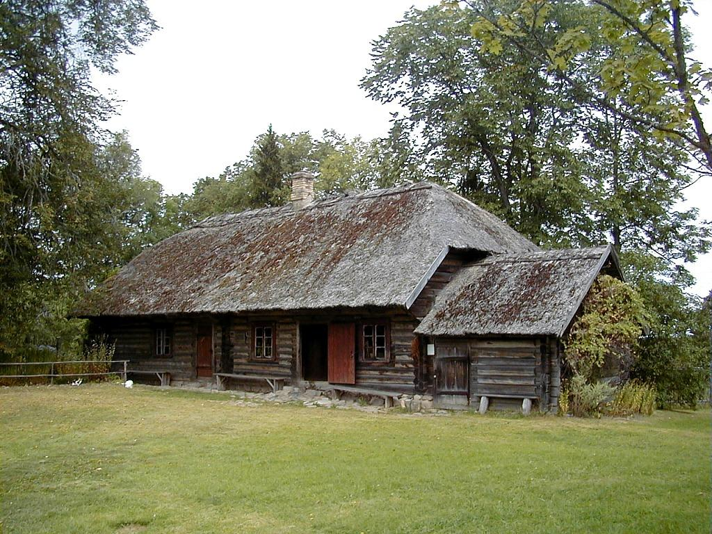 Braki - R. Blaumaņa muzejs 1999-08-16